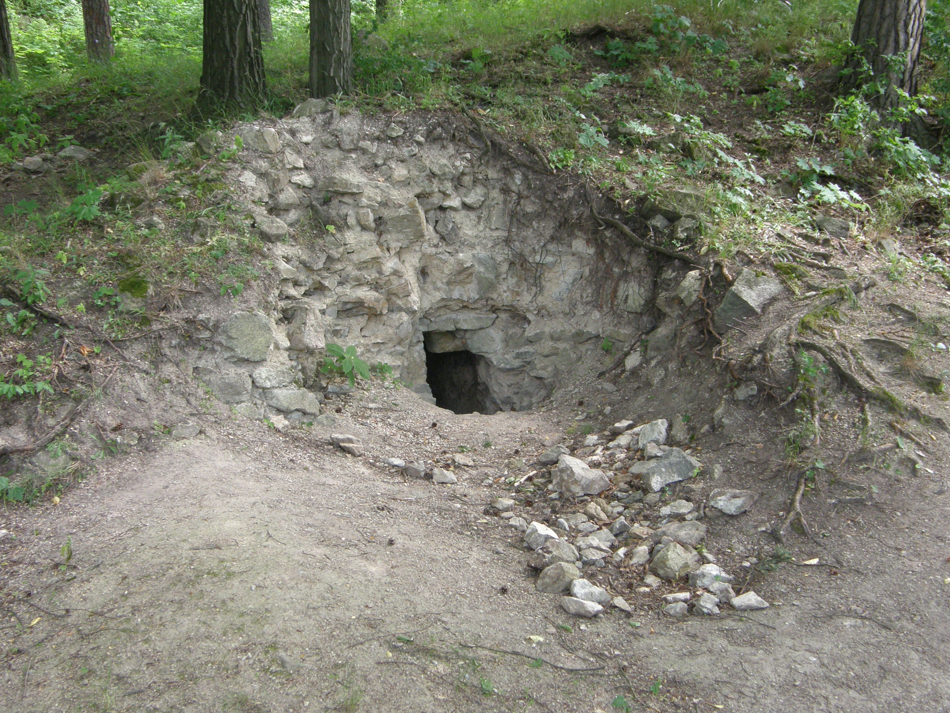 Čertův hrádek